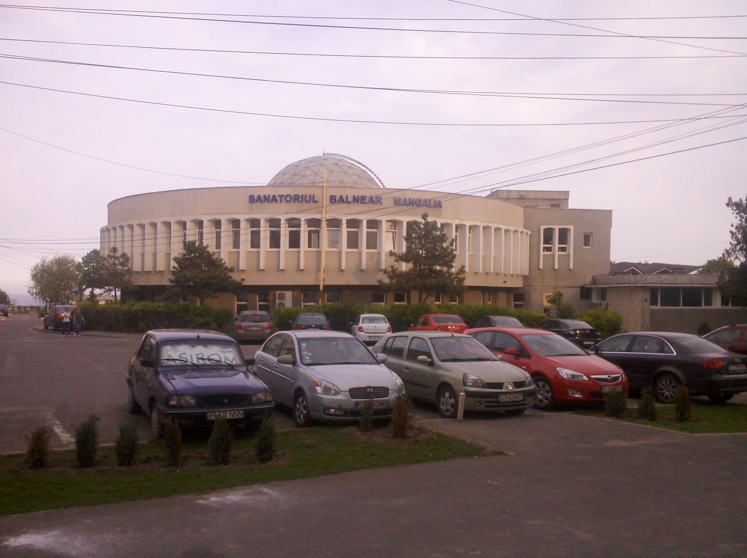 el balneario de Mangalia